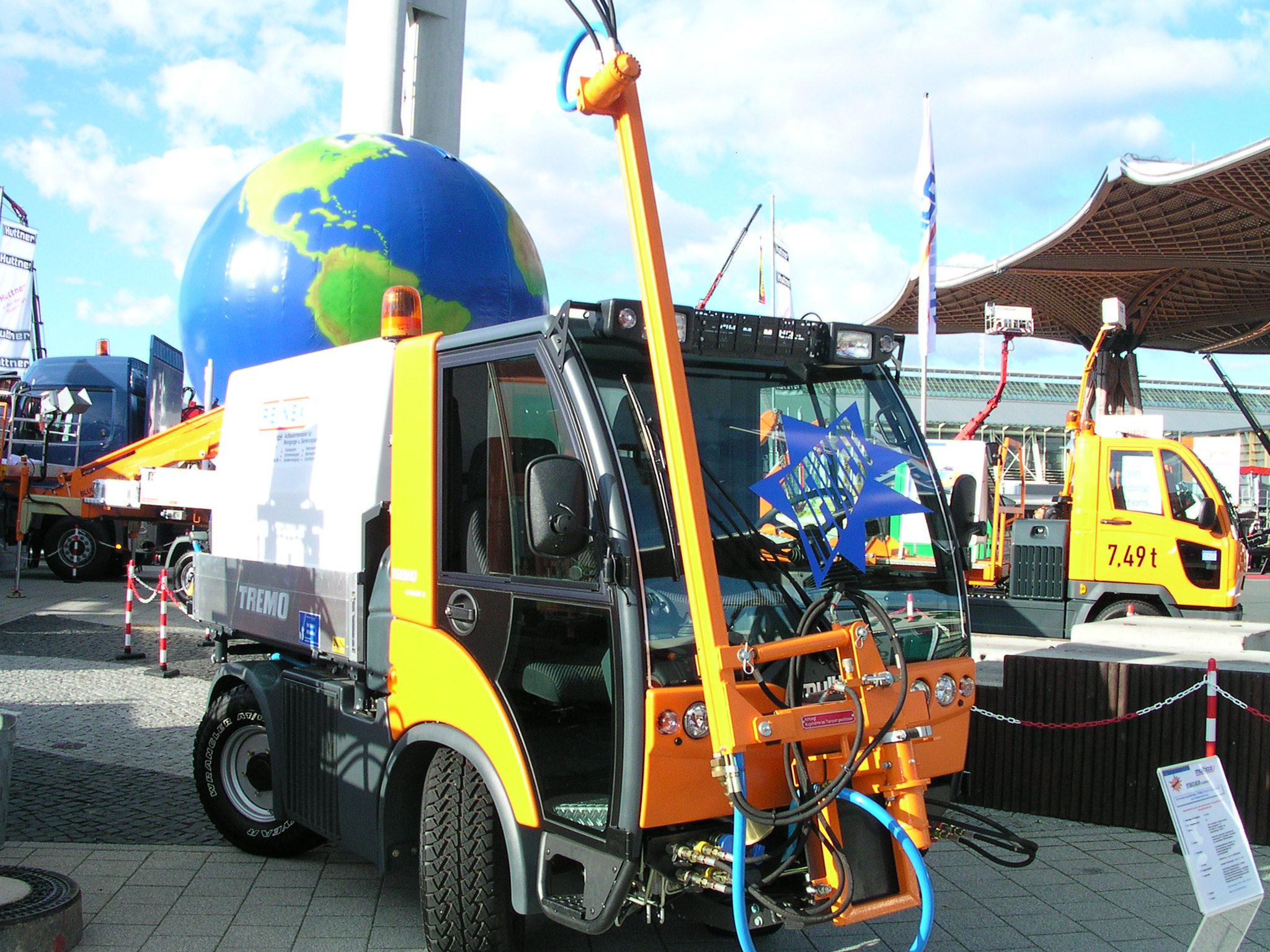 Multicar-Stand bei der Nutzfahrzeug-IAA 2004 in Hannover; hier ein Modell mit Allradlenkung